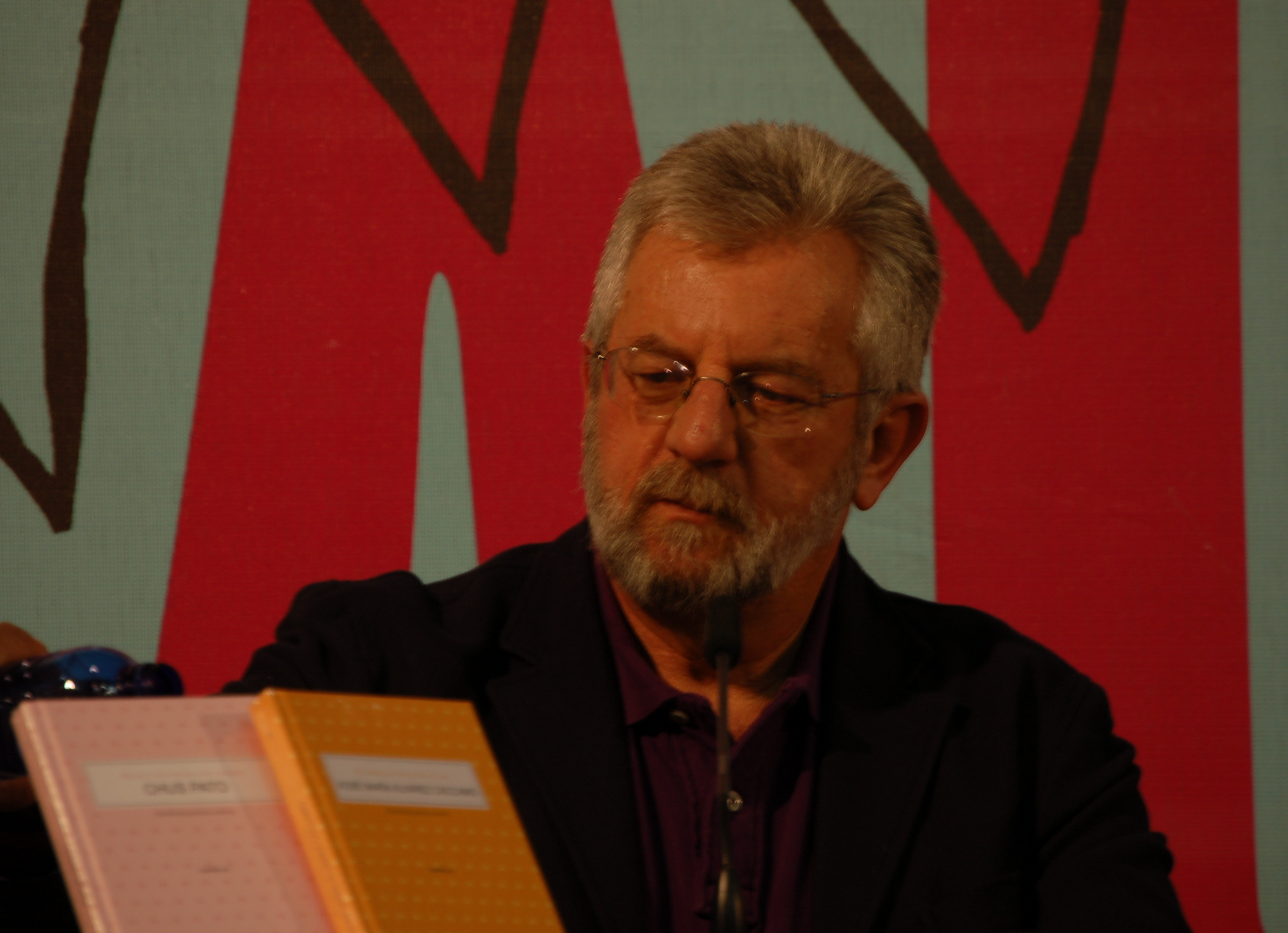 Xosé María Álvarez Cáccamo no Culturgal 2010